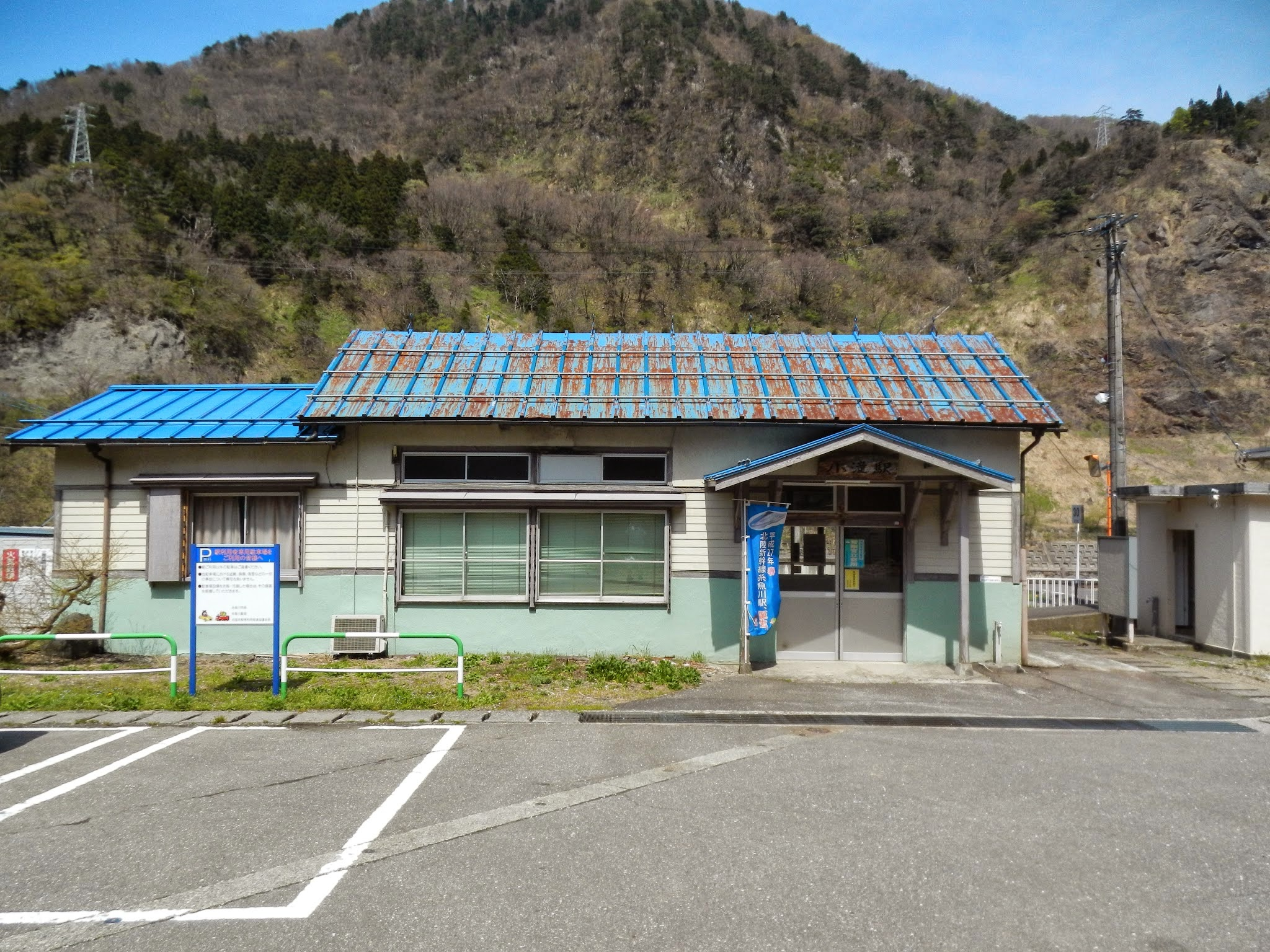 Kotaki, Itoigawa, Niigata Prefecture 949-0462, Japan